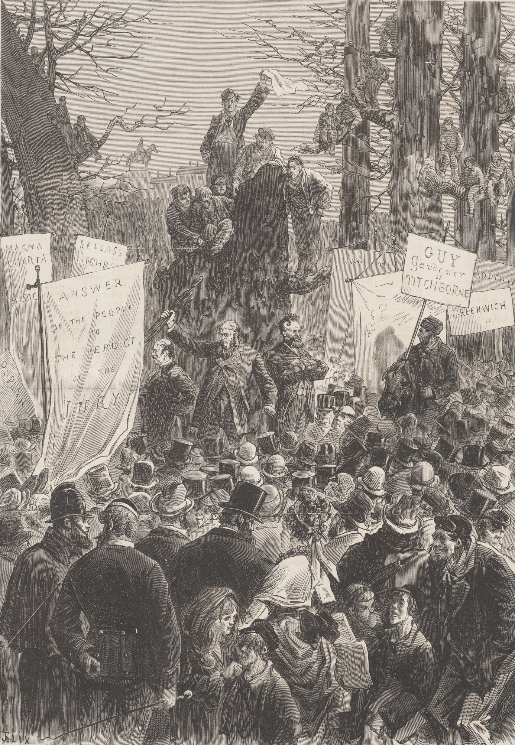 "Les mœurs anglaises. - Le grand meeting de Hyde Park pour la mise en liberté de Titchborn [sic]. - (Dessin de M. Lix, croquis de M. Montbart".